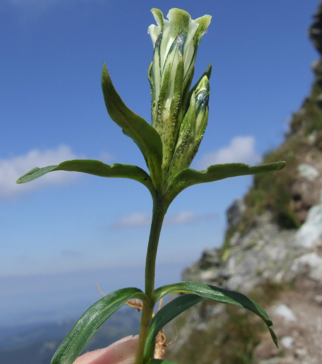 Gentiana frigida (pl. goryczka przezroczysta), habitat:West Tatra Mountains, Banikov